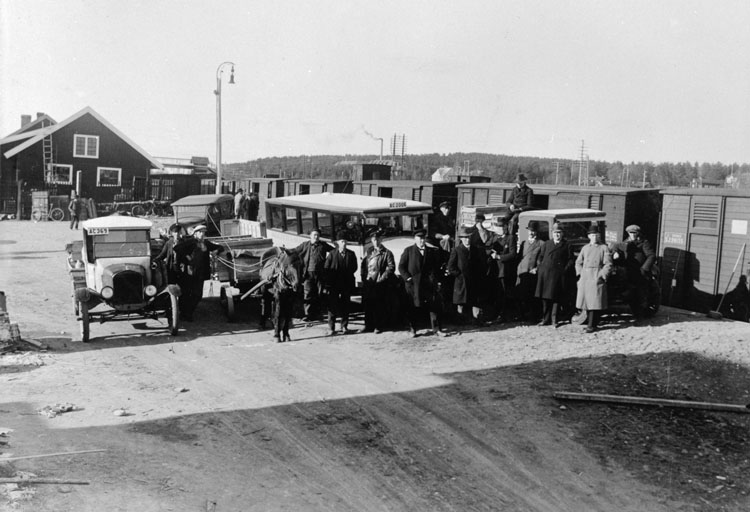 Tyska lingonuppköpare vid Skellefteå järnvägsstation år 1925. Längstt ill vänster står Pedro Eriksson från Skellefteå och Ruben Lundström från Gärdsmark som håller i tömmarna till sin häst. Ruben Lundström brukade leverera lingon han köpt upp till grossister.